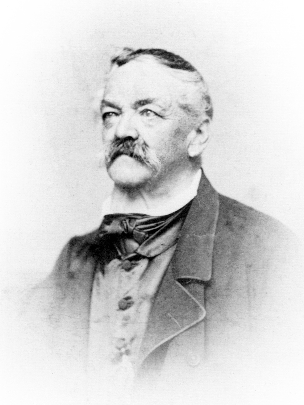 Portrait von Caspar Zeitlinger, Foto von Aug. Red Photographie & Lithographie Linz